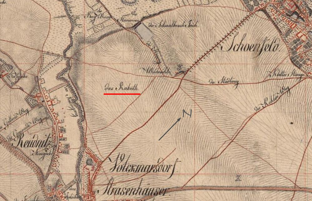 Die Flur Rabeth auf einer Karte von 1802 (Ausschnitt aus Meilenblätter von Sachsen 1780–1806, Blatt 19)